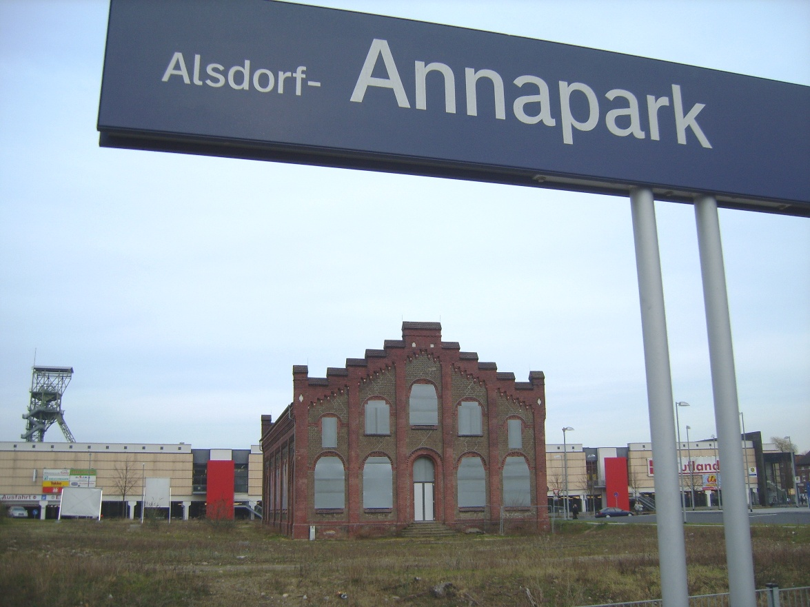 Euregiobahn-Haltepunktschild Alsdorf-Annapark mit Förderturm und Zechengebäude im Hintergrund